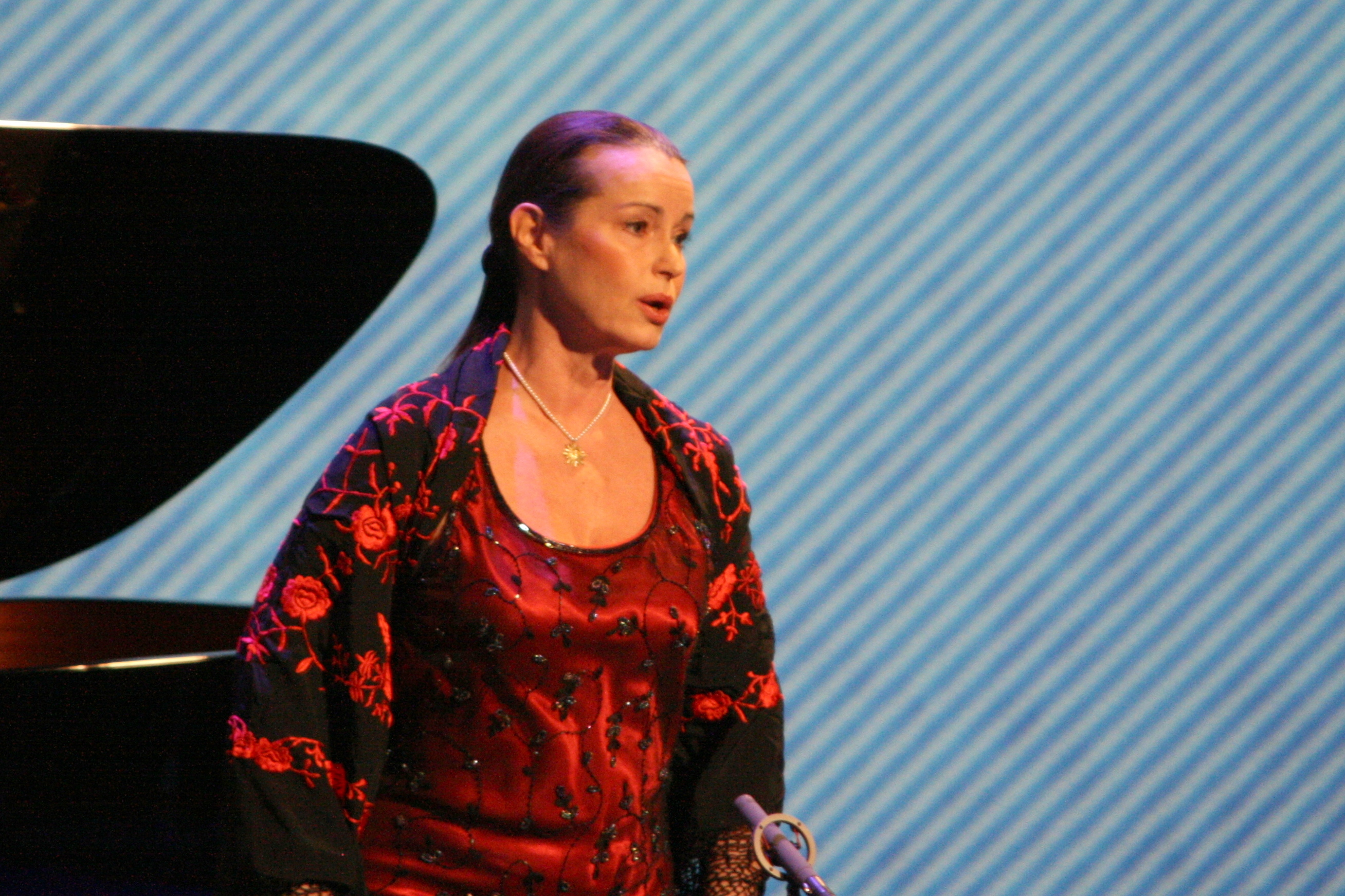 Elizabeth Norberg-Schulz, operasangerinne. Fra NHOs Årskonferanse 2009.